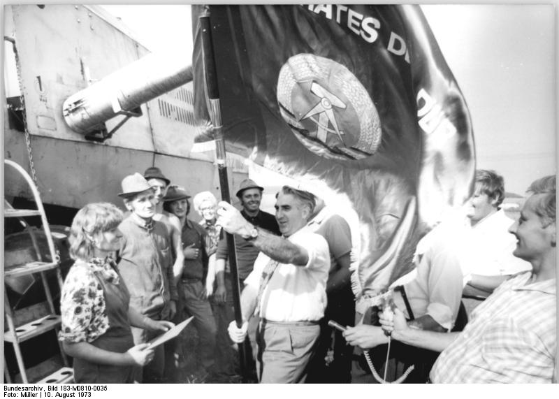 LPG Angermünde, Ehrung durch Georg Ewald ADN-ZB Müller 10.8.1973 Bez. Frankenfurt-O.: Minister Ewald bei Angermünder Genossenschaftsbauern- Für ihre beispielgebenden Leistungen bei der Ernte in der ersten Dekade des Monats August wurde dem Mähdrescherkomplex der Kooperativen Abteilung Pflanzenproduktion Angermünde die Wanderfahne des Ministerrates für den Wettbewerb in der Getreideernte 1973 verliehen. Auf einem Weizenfeld der Sorte "Mironowskaja 808" unmittelbar vor den Toren der uckermärkischen Kreisstadt überreichte am 10. Aug. 1973 Georg Ewald (M), Kandidat des Politbüros des ZK der SED und inister für Land, Forst- und Nahrungsgüterwirtschaft, dem Kollektiv dieser Abteilung als Sieger der Wettbewerbsgruppe der Bezirke Frankfurt-O., Cottbus, Potsdam und der Hauptstadt Berlin diese hohe auszeichnung. Hiltraut Welzin, Adolf Hamel und die weiteren 4 Fahrer der Kombines E 512 hatten seit Monatsbeginn von 720 Hektar vorwiegend Winterraps und Sommergerste geerntet.